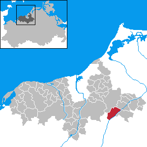 Cammin in Mecklenburg-Western Pomerania - District Bad Doberan